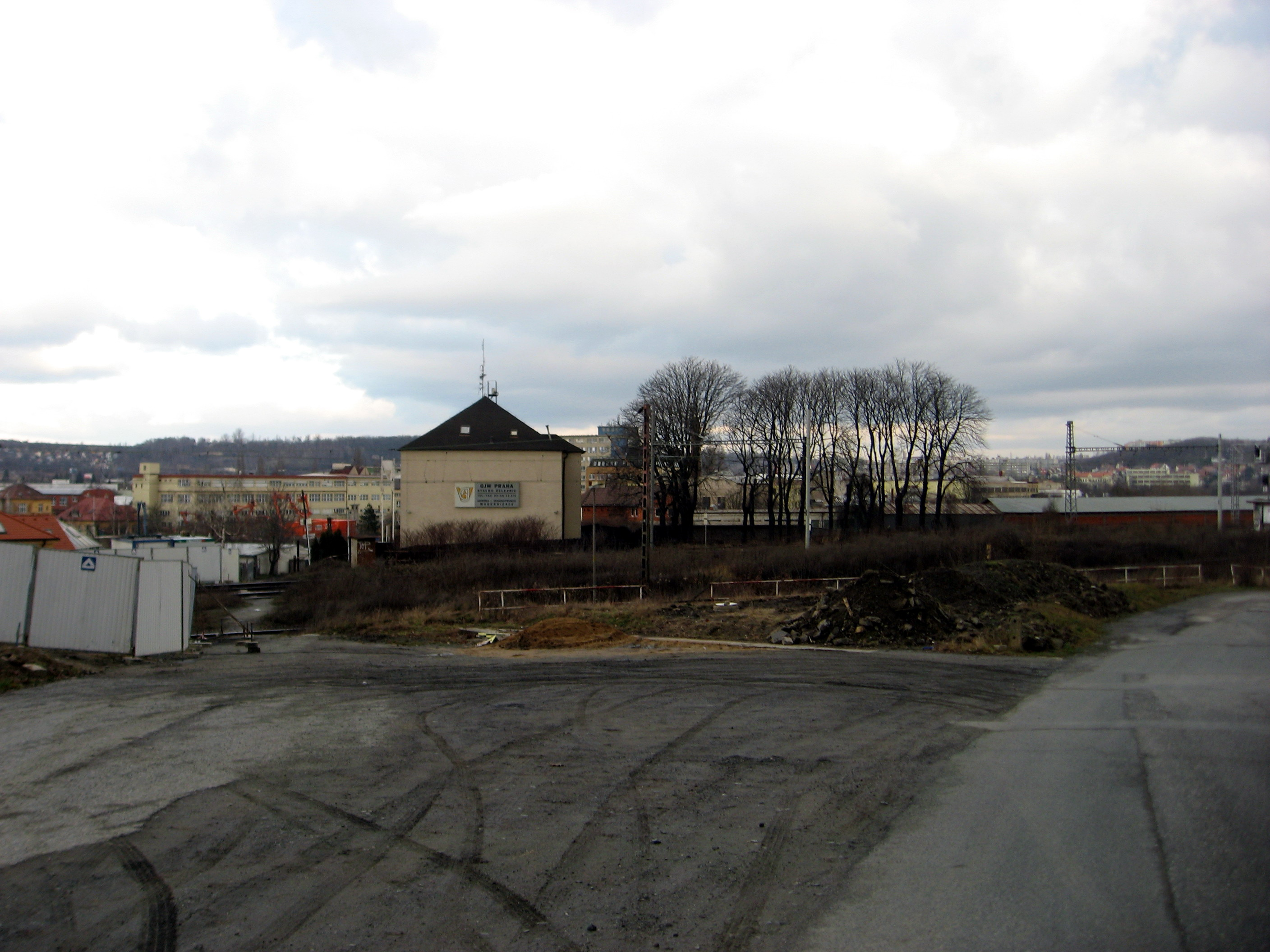 Železnice u Mezitraťové v době stavby podchodu